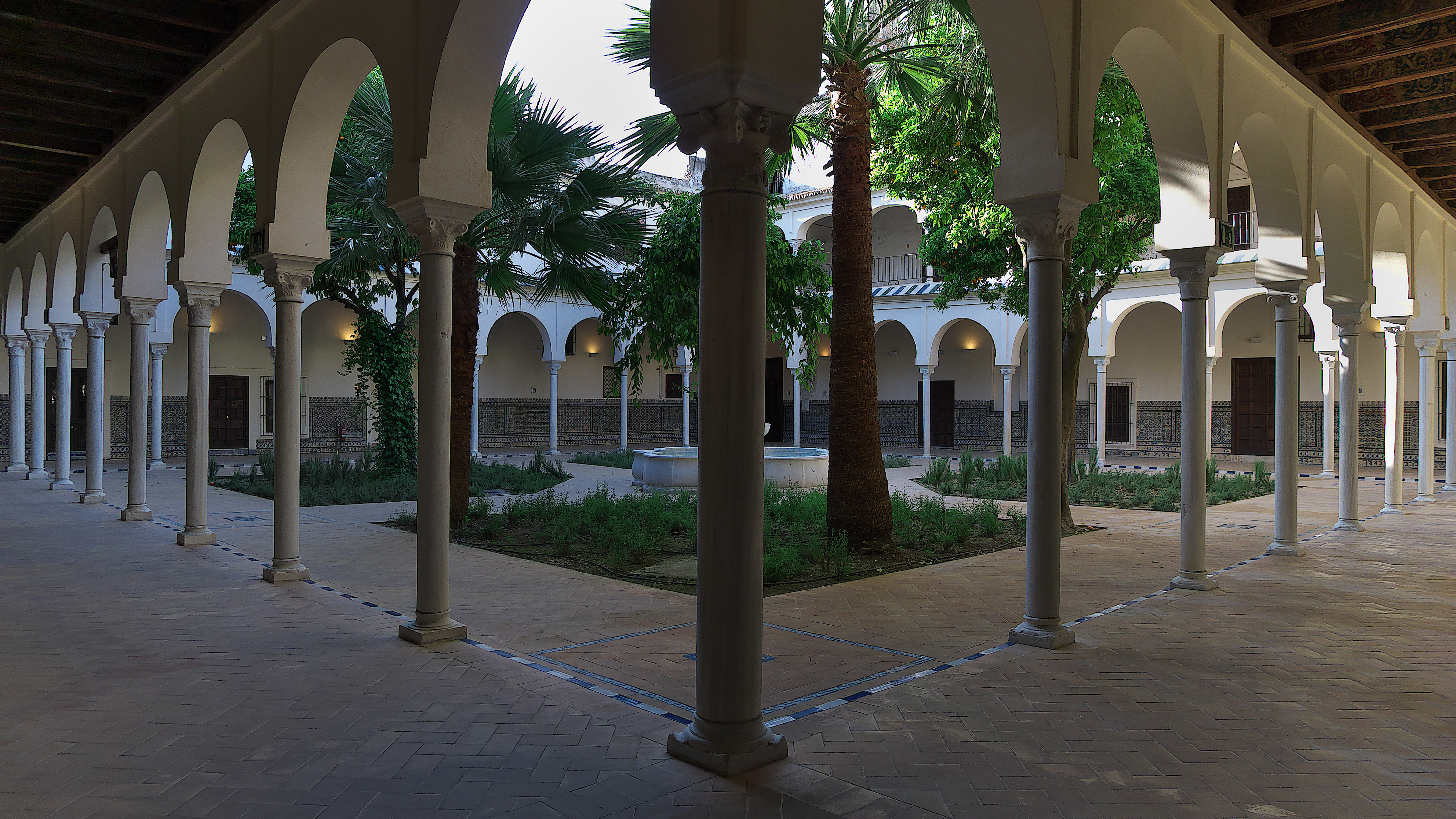 El rey Sancho IV cede el palacio del infante don Fadrique a las monjas clarisas, y doña María de Molina realiza una importante aportación económica (1289). Claustro renacentista (1532).